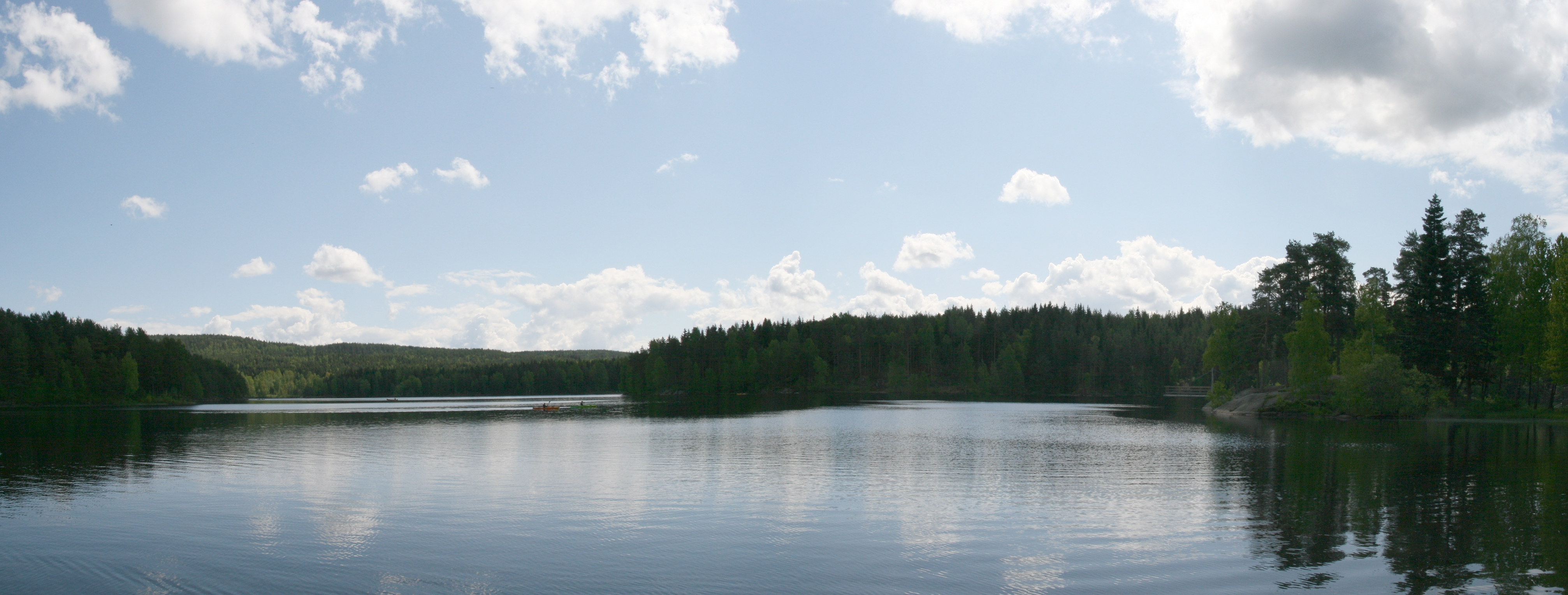 Nøklevann i Østmarka i Oslo, sett fra Bråten